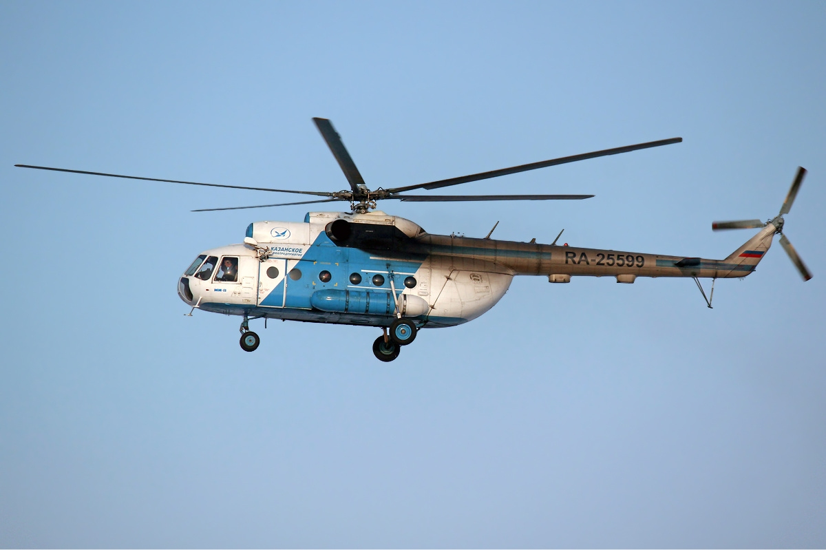 Kazan Air Enterprise Mil Mi-8T